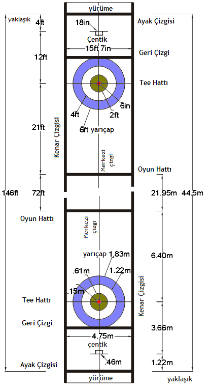 Dosya kendi çalışmamdır. --~Tarkovsky~ 21:15, 1 Kasım 2006 (UTC)